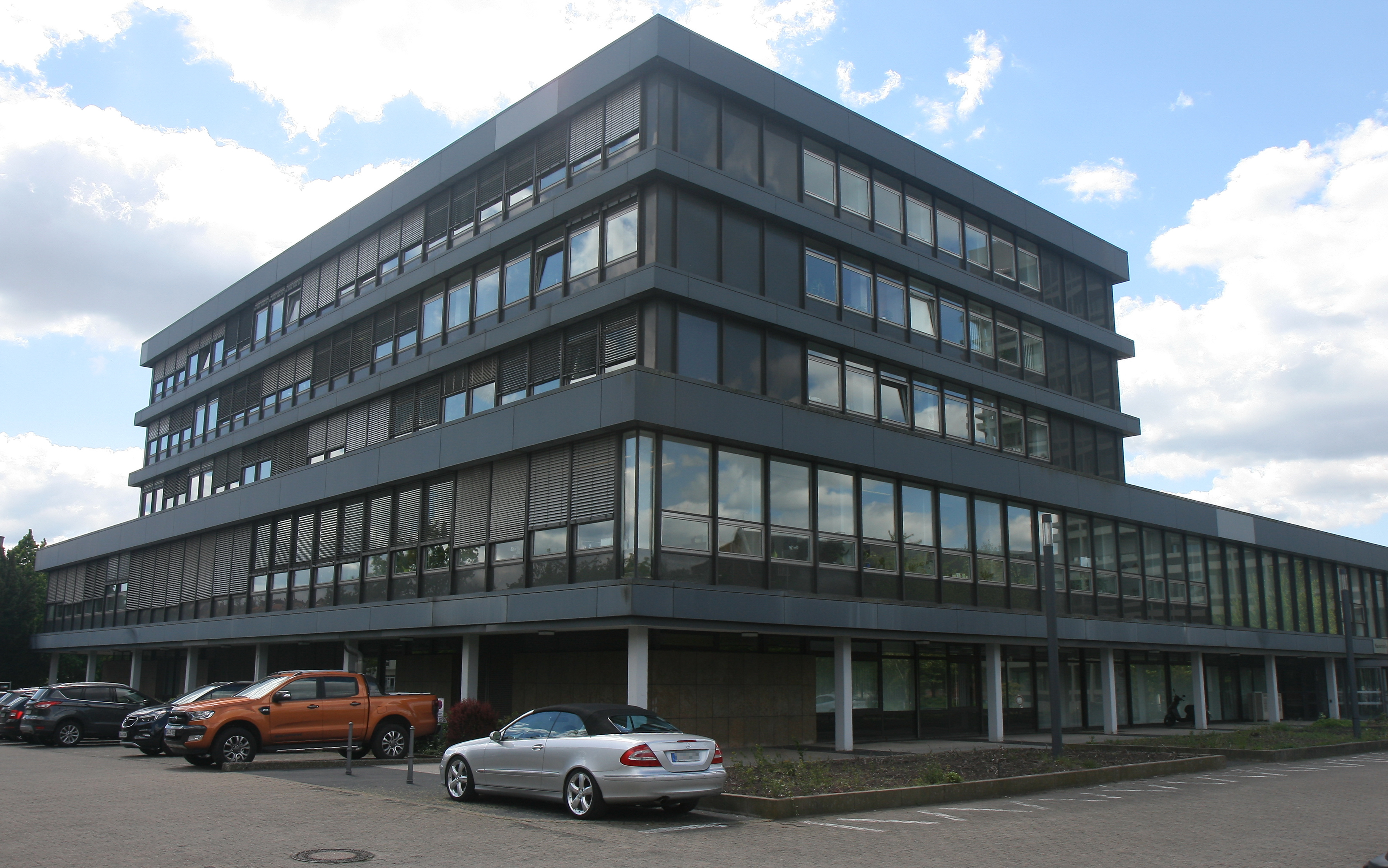 Justizbehörden Hildesheim (Amtsgericht, Landgericht und Staatsanwaltschaft), Kaiserstraße 60 in Hildesheim.